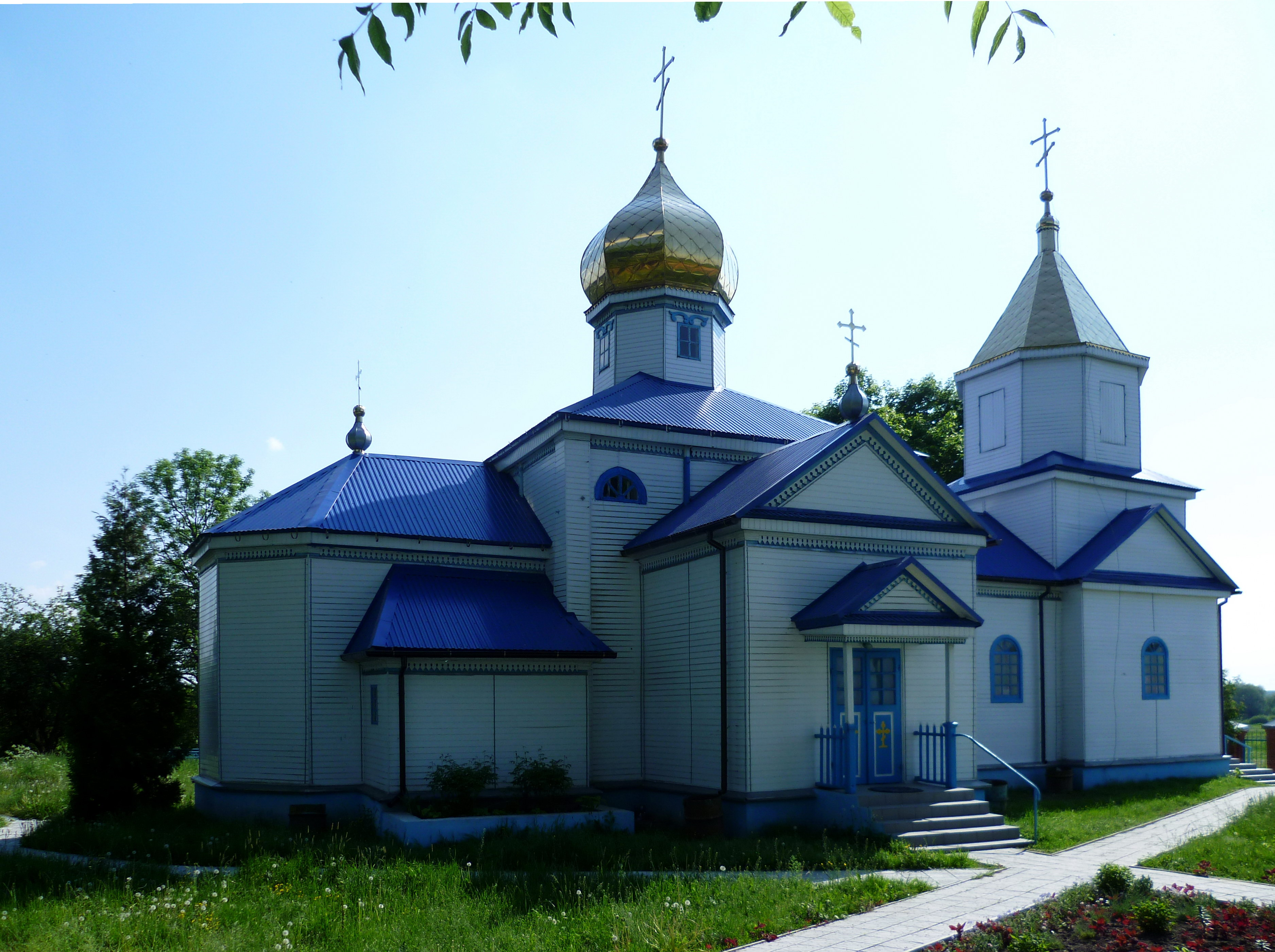 Введенська церква (1791 р.) - вигляд з північного сходу - Литовеж (0,5 км на південь від села, біля дачного масиву) Іваничівський район Волинська область Україна